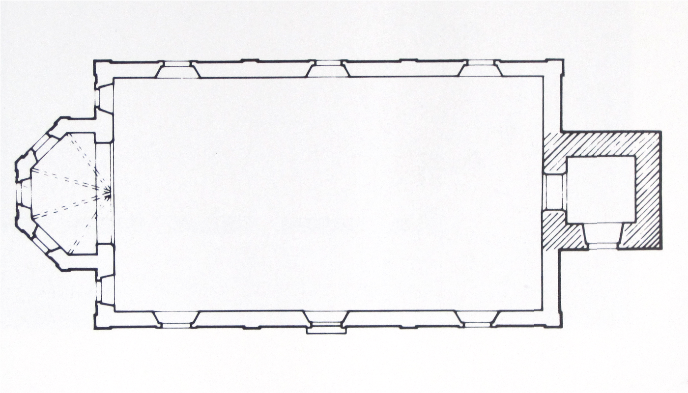 Petruskirche in Mannheim-Wallstadt